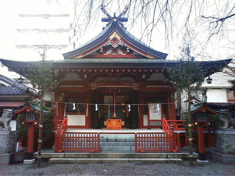 akihajinja(taitoku) main temple. Taitoku, Tokyo.